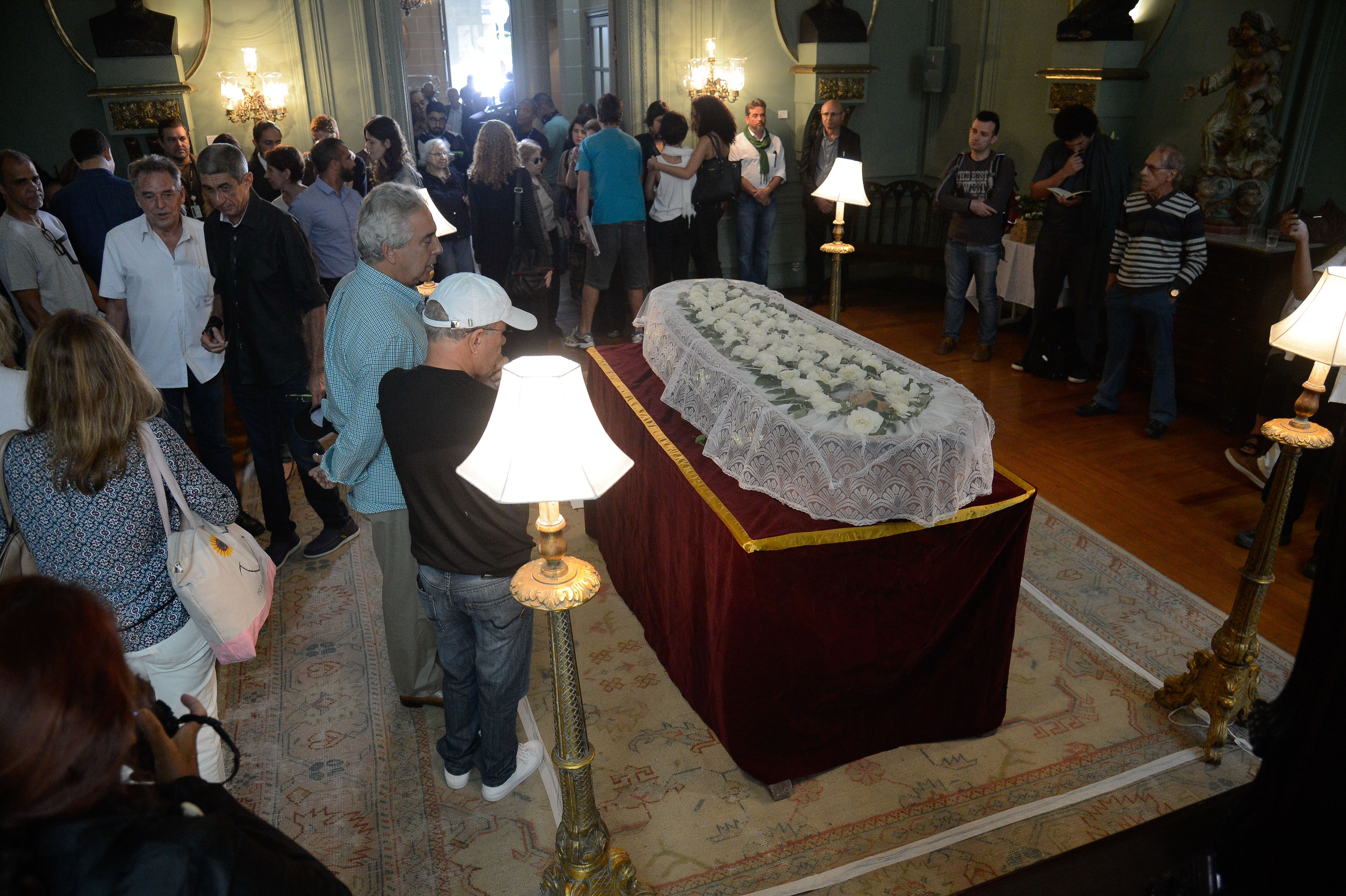 Rio de Janeiro - Parentes e amigos no velório do poeta Ferreira Gullar, na Academia Brasileira de Letras (ABL), no centro da capital fluminense.